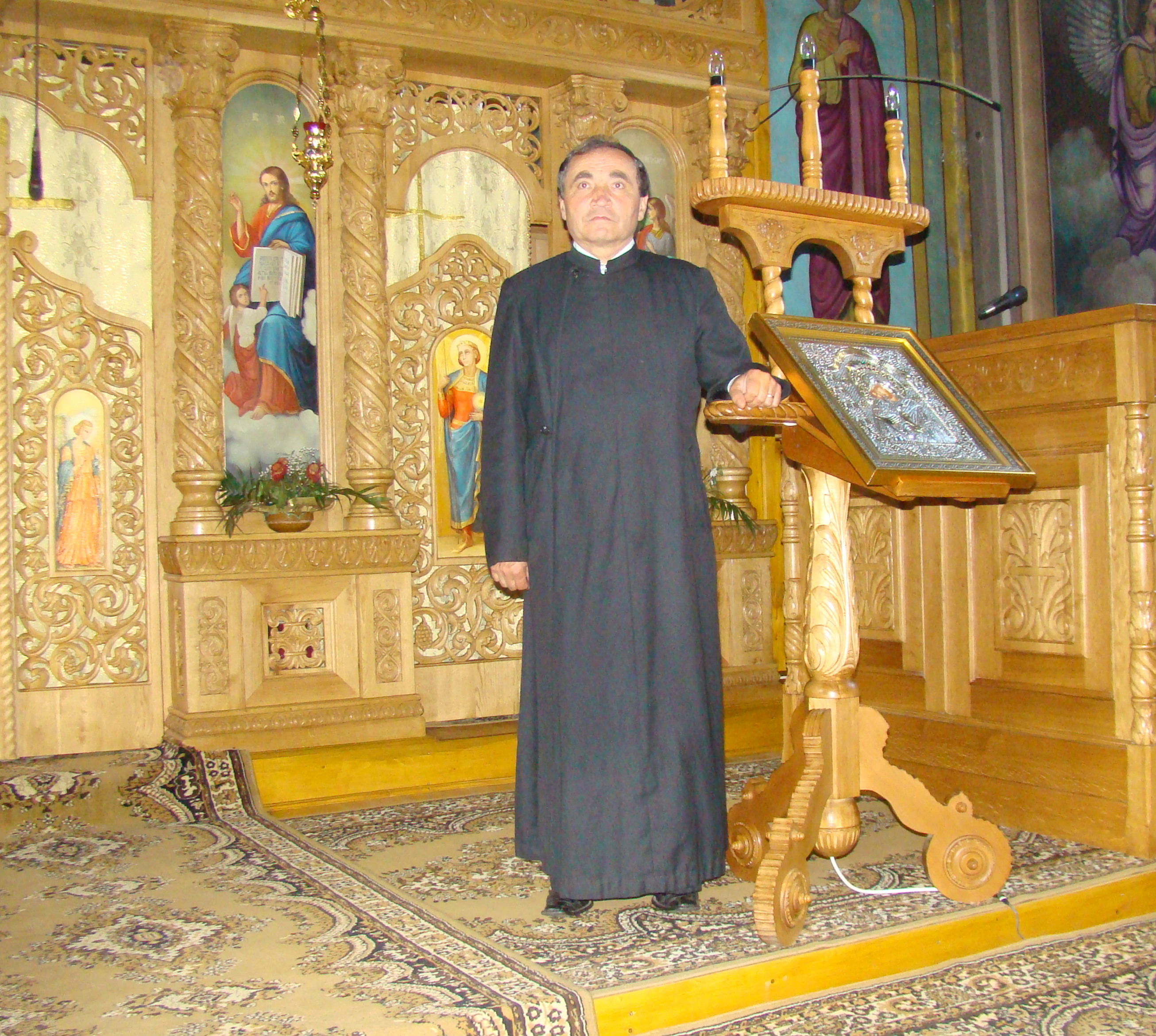 Răchițele, județul Cluj